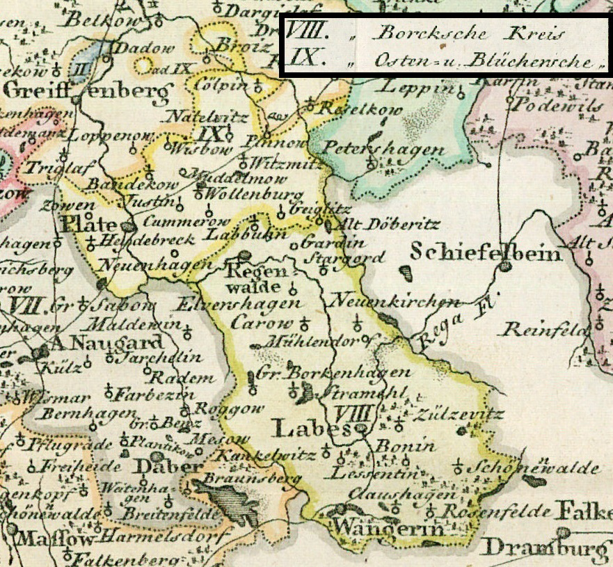 Ausschnitt aus "Landkarte des Herzogtums Vor- und Hinterpommern aus dem Jahr 1794